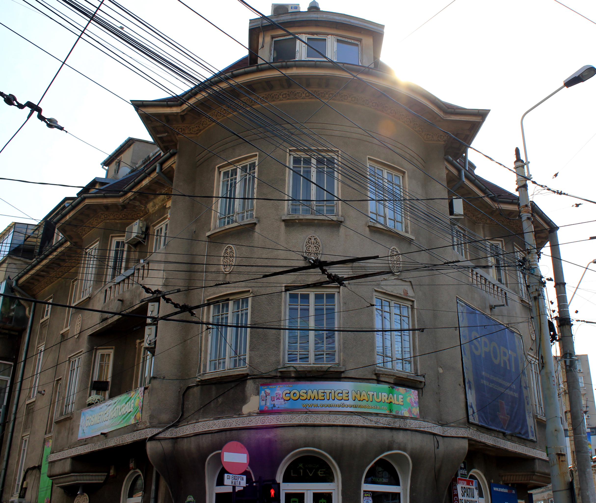 Casă Traian 208